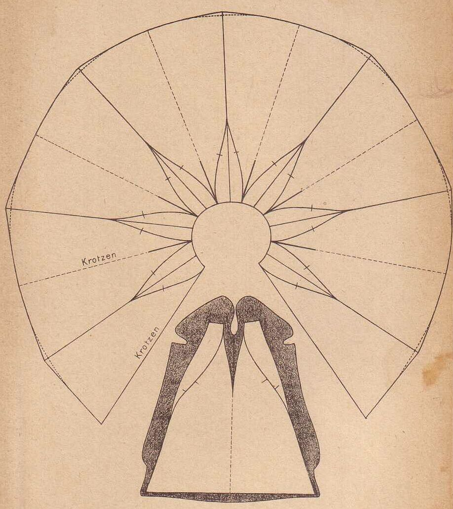 Graphics for Furriers Pelerine von 7 Kanin